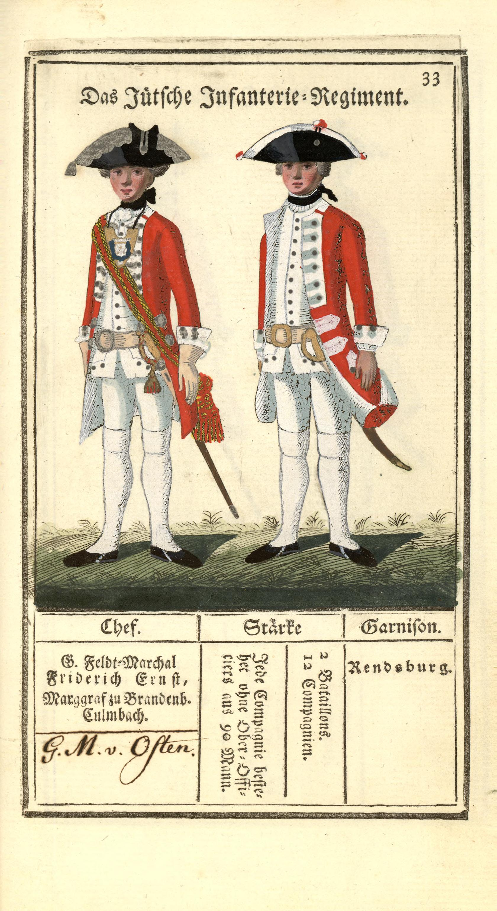 Illustrasjon hentet fra boken "Vorstellung der sämtlichen Königl. Dänischen Armee" av Bertram, Carl og utgitt av Carl Bertram (dk, 1763)